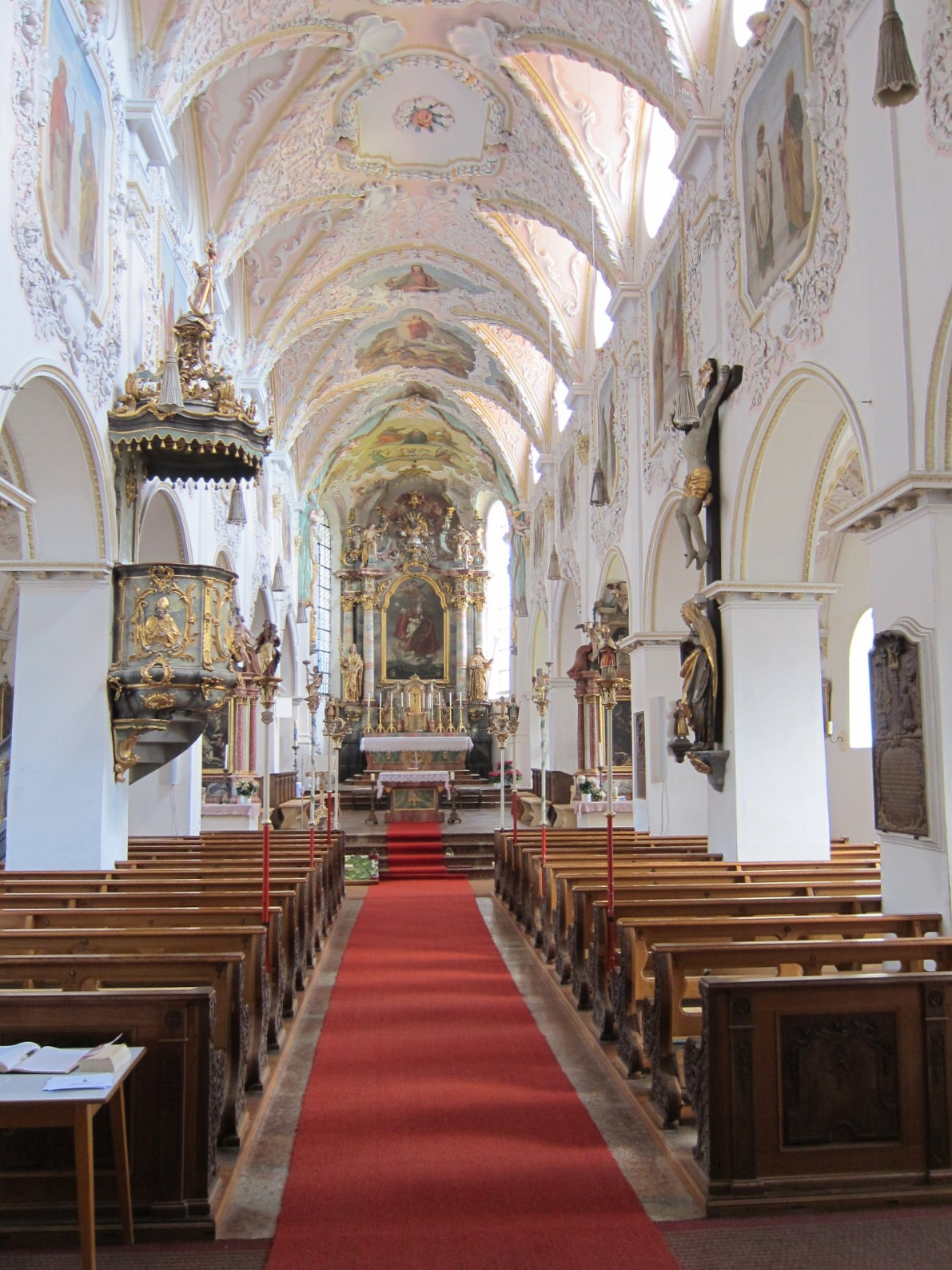 Ehemalige Kollegiatsstiftkirche, jetzt katholische Pfarrkirche St. Zeno, dreischiffige Pfeilerbasilika mit Krypta und drei Apsiden nach dem Vorbild des Freisinger Domes um 1200 errichtet, Barockisierung 1697-1701 und um 1730.